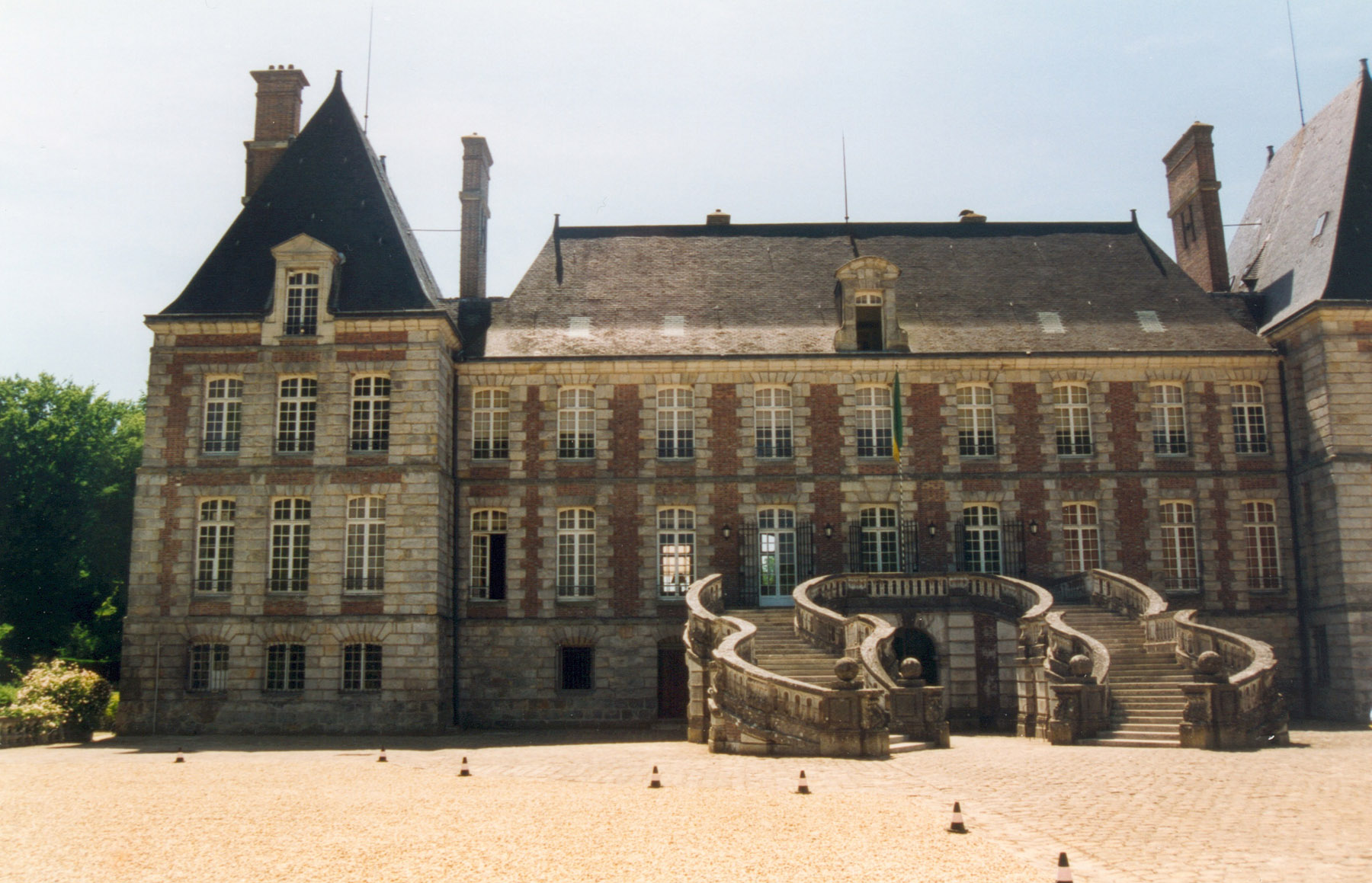 Perron avec escalier en fer-à-cheval (en double fer-à-cheval, côté cour du château de Courances (Essonne, France).